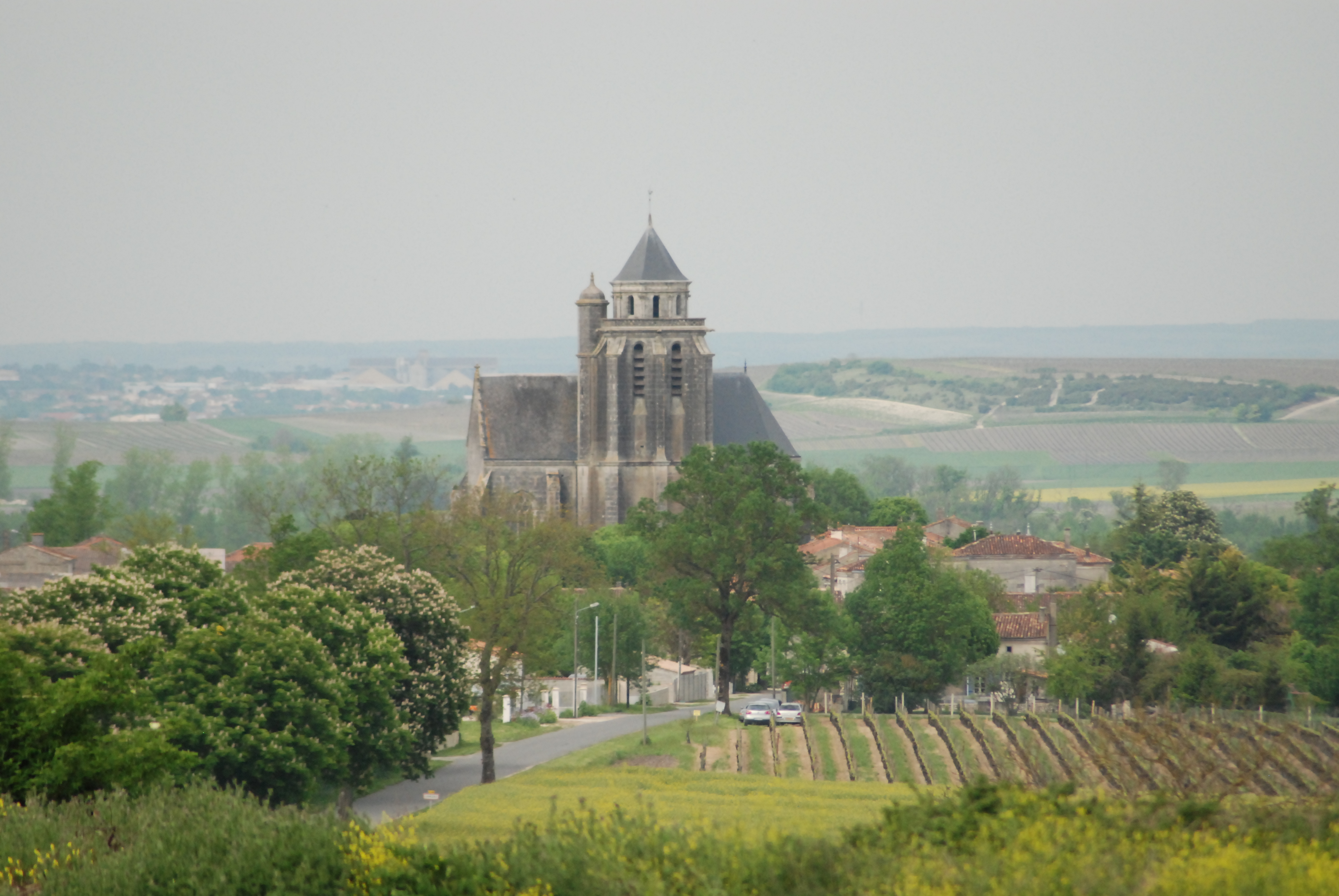 Eglise de Lonzac